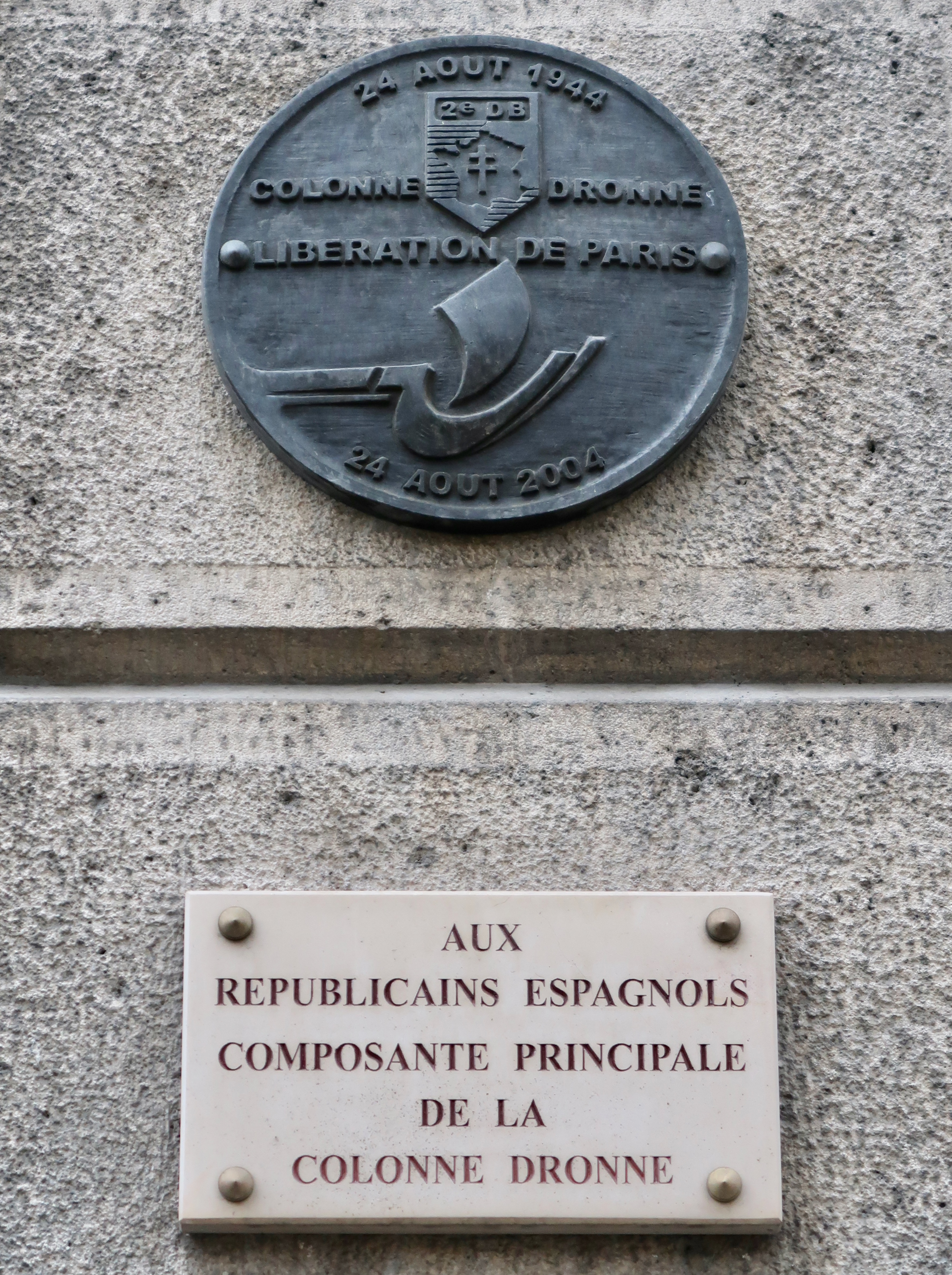 Plaque en hommage à La Nueve (Libération de Paris), 9 place de l'Hôtel-de-Ville - Esplanade de la Libération (Paris, 4e).